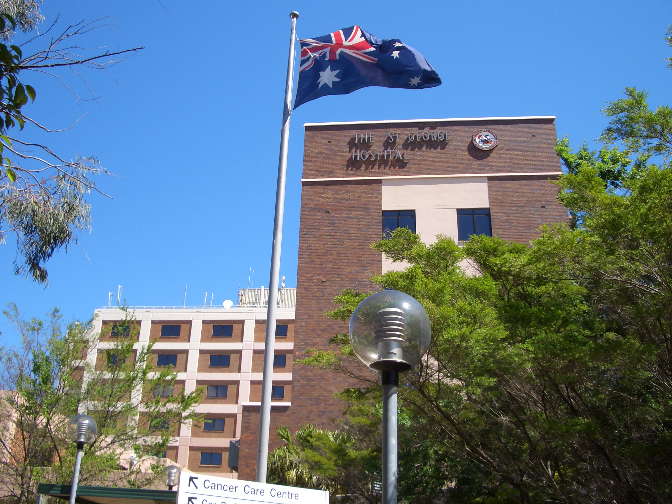 St George Hospital, Kogarah